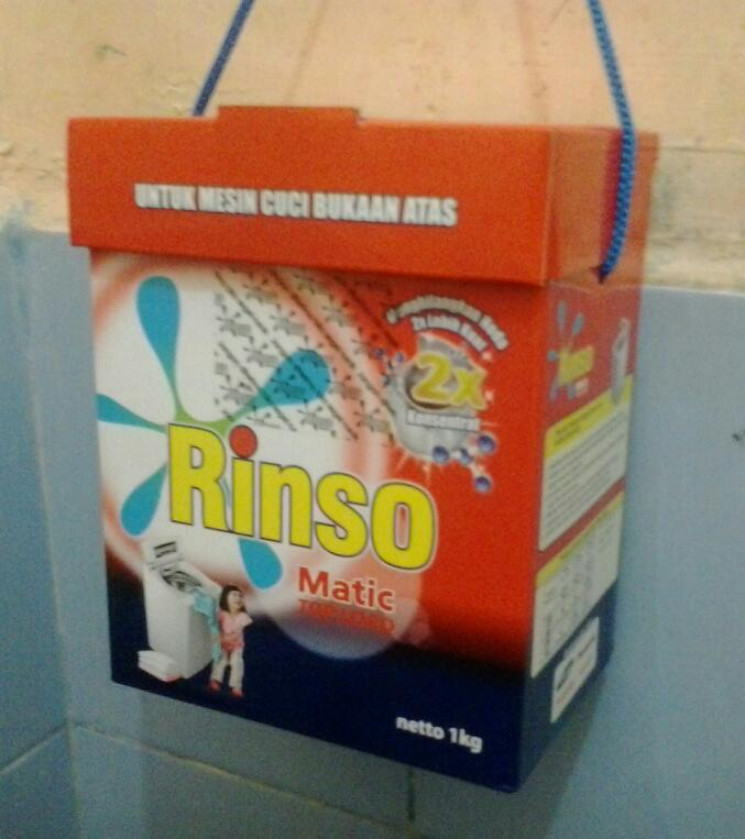 Kemasan deterjen pencuci Rinso Matic